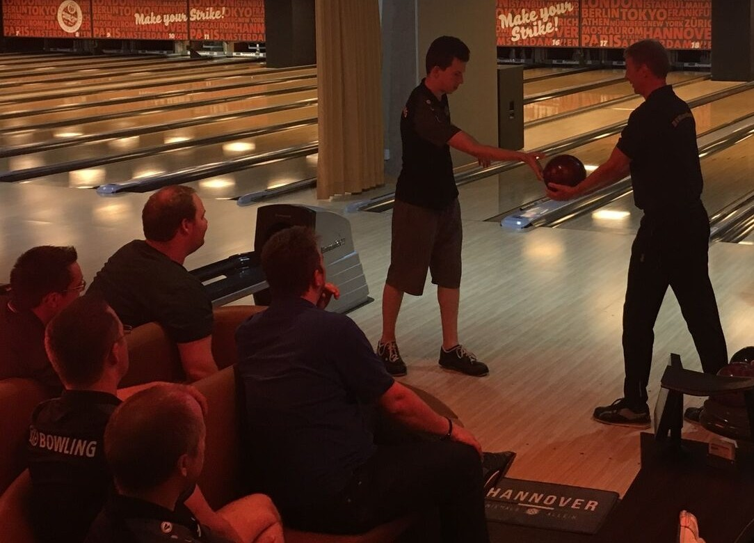 ETBF-Level-1-Ausbildung zum Bowlingtrainer, praktischer Unterricht